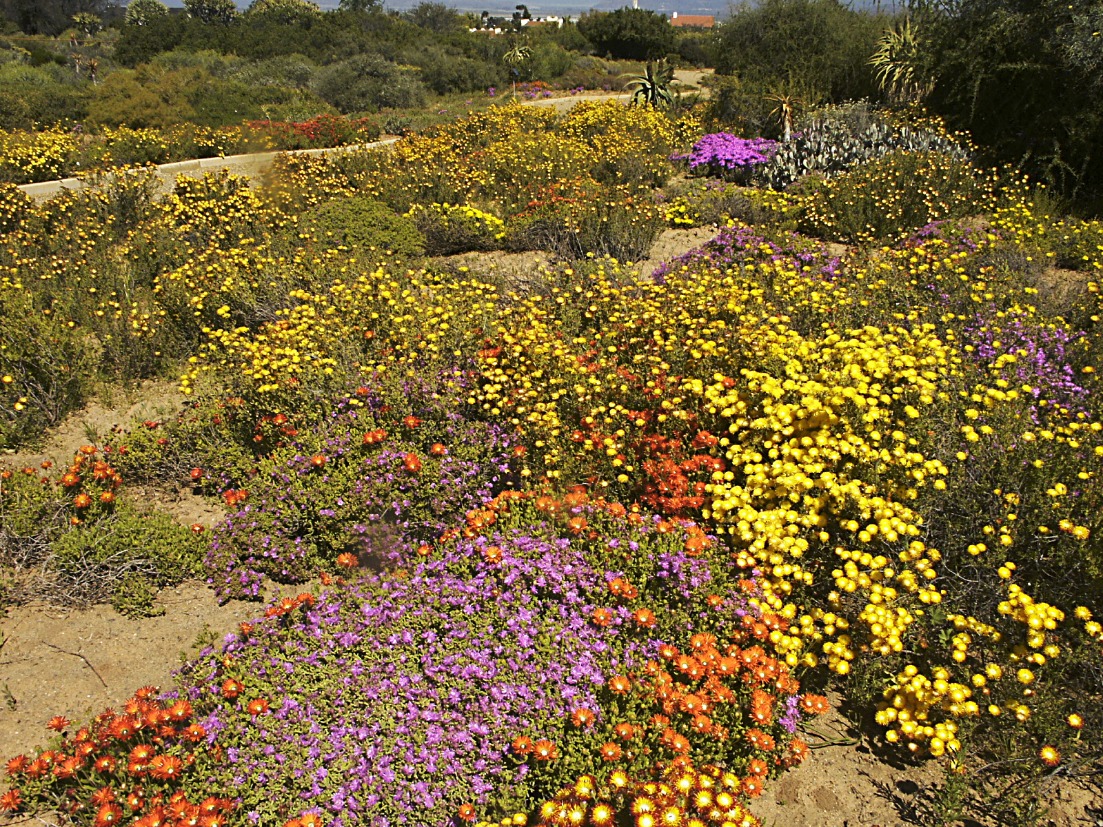 Der Karoo Desert National Botanical Garden im Westkap, Südafrika